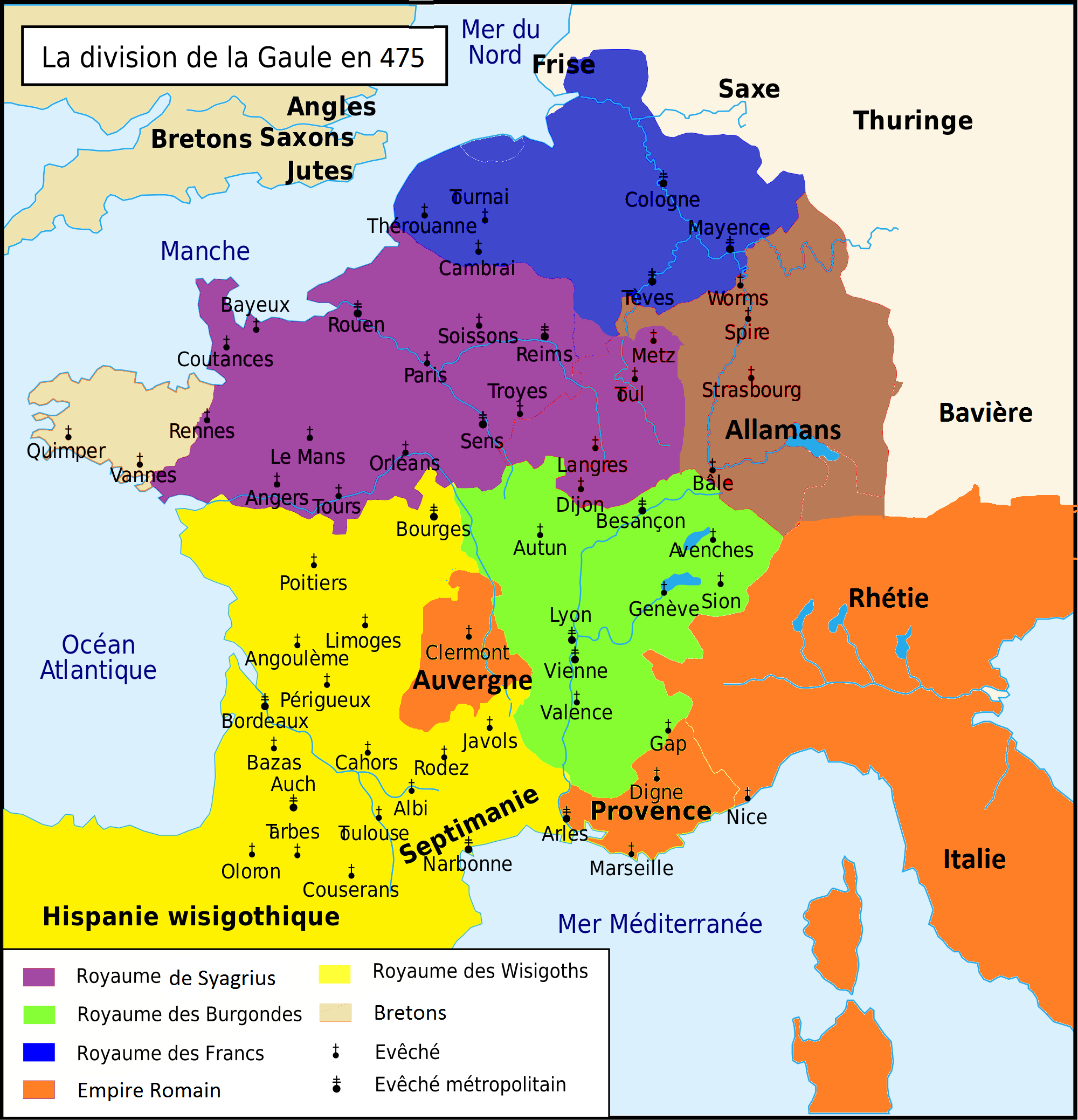 Division de la Gaule en 475. Légende Bleu : Royaume Franc. Orange : Empire romain d'Occident (+ Auvergne). Jaune : Royaume Wisigoth. Vert : Royaume Burgonde. Violet : Royaume de Syagrius. Marron : Royaume des Alamans. Beige : Bretons.